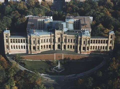 Maximilianeum